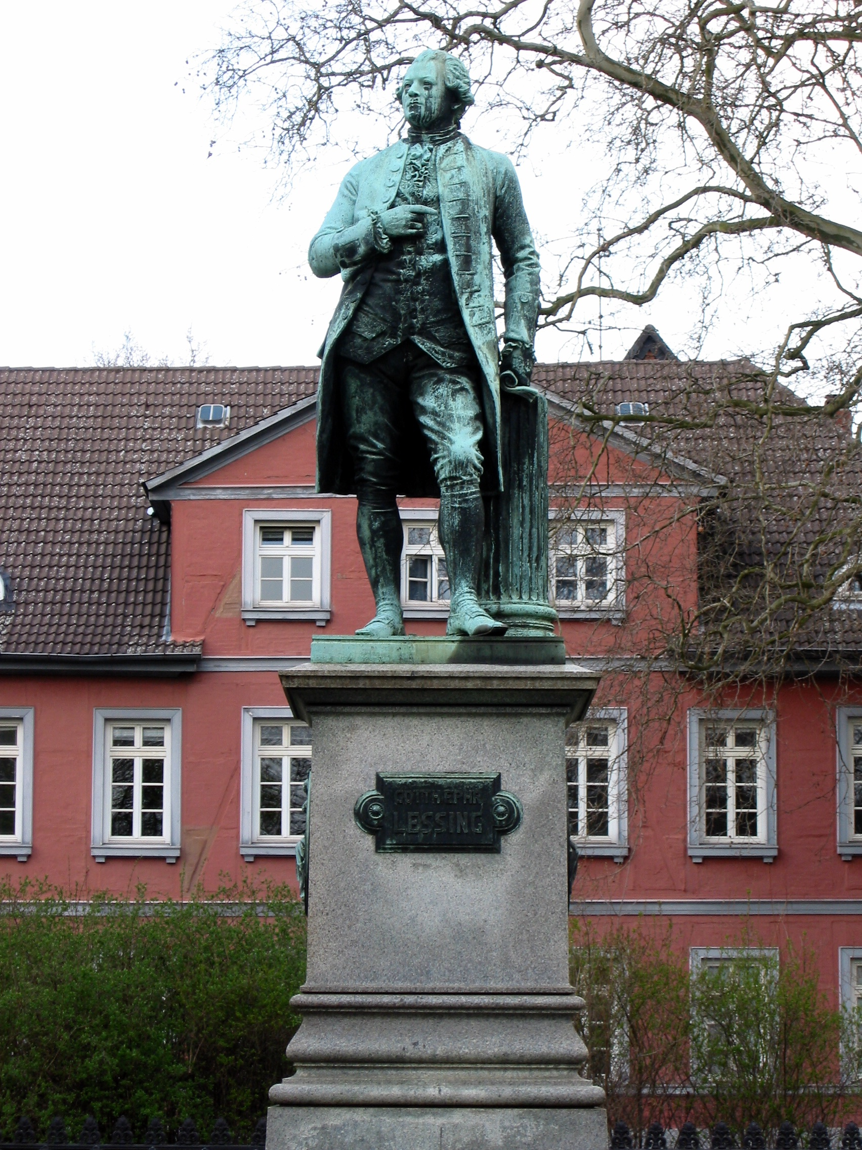 Braunschweig, Lessingdenkmal (Lessingplatz)